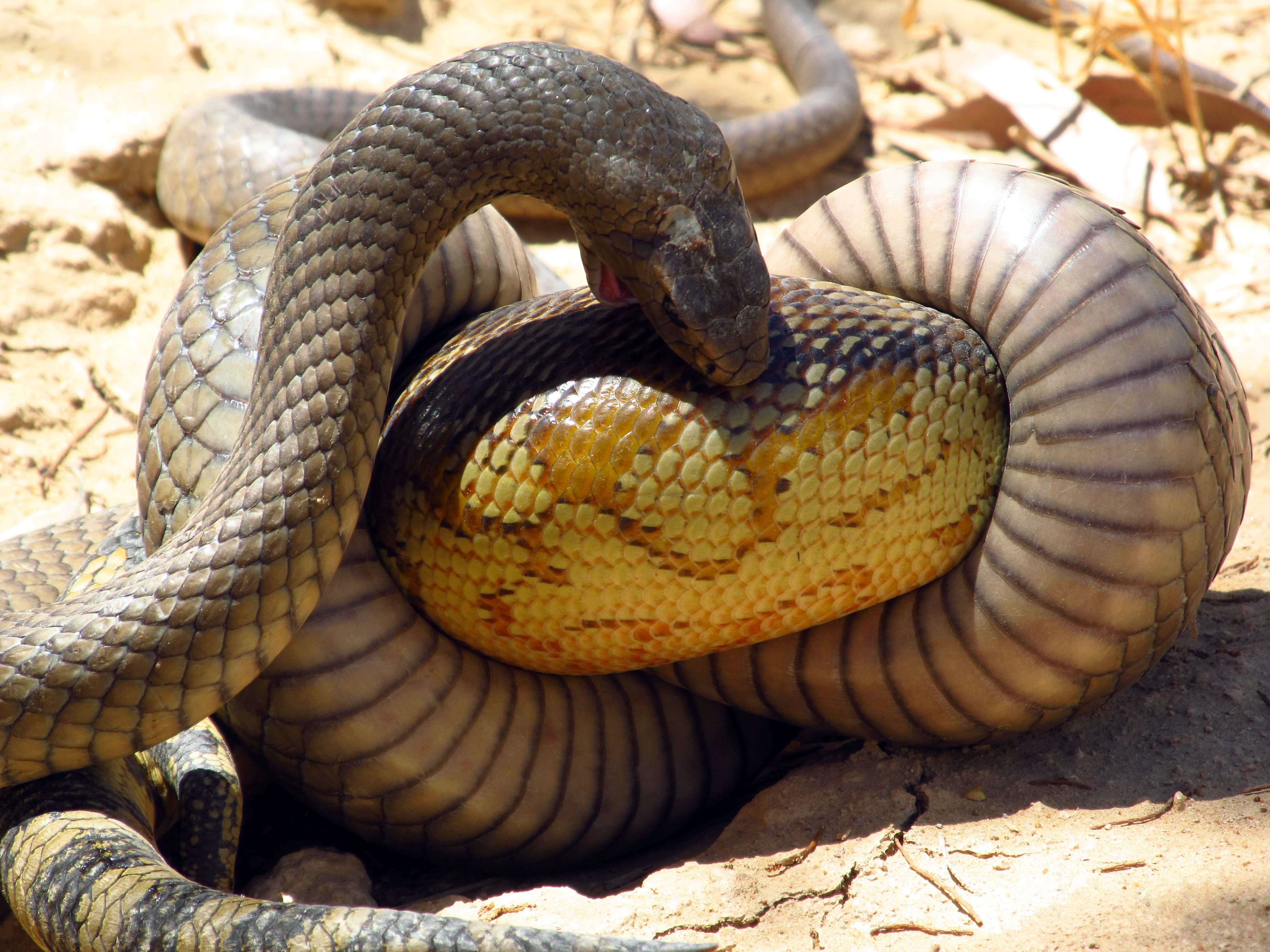 Northern Victoria. Australia. (Pseudonaja textilis VS Tiliqua scincoides scincoides)